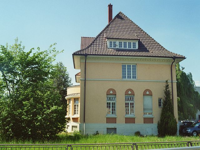 Denkmalgeschützte Villa Colsman am Maybachplatz 5 in Friedrichshafen. Baustil: Landhausstil. Erbaut: 1909. Dienstvilla des Generaldirektors des Zeppelin-Konzerns Dr. Alfred Colsman.